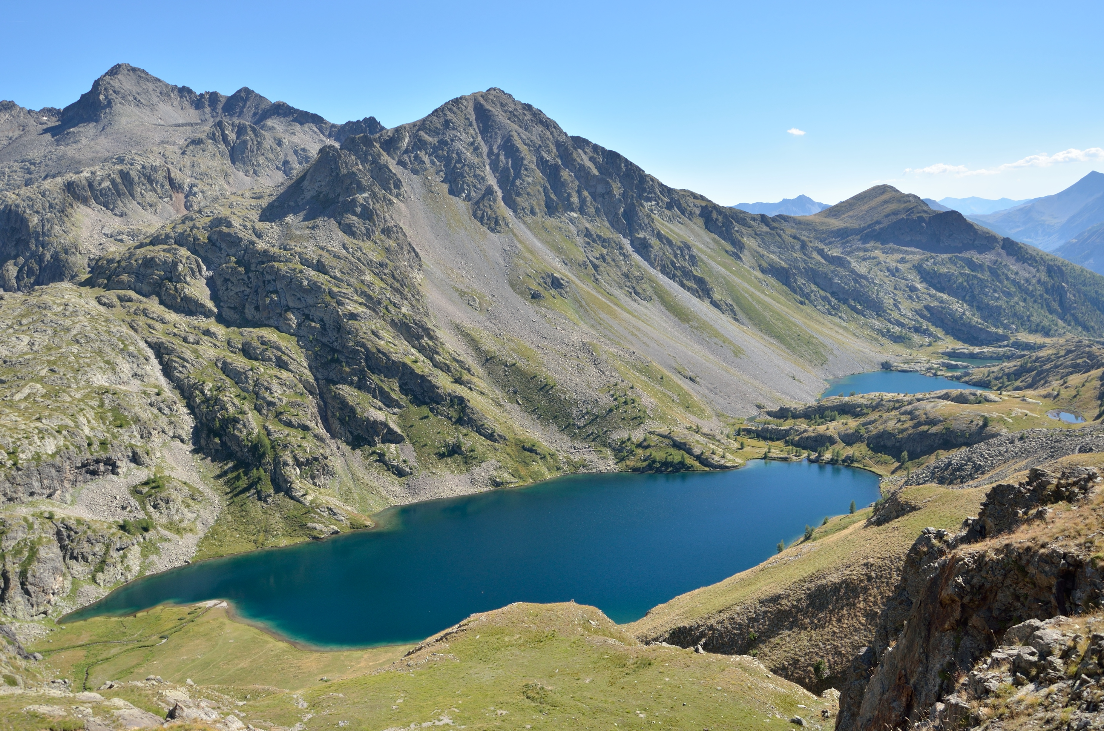 Vues sur les lacs de Vens, dans le Parc national du Mercantour (Alpes-Maritimes)